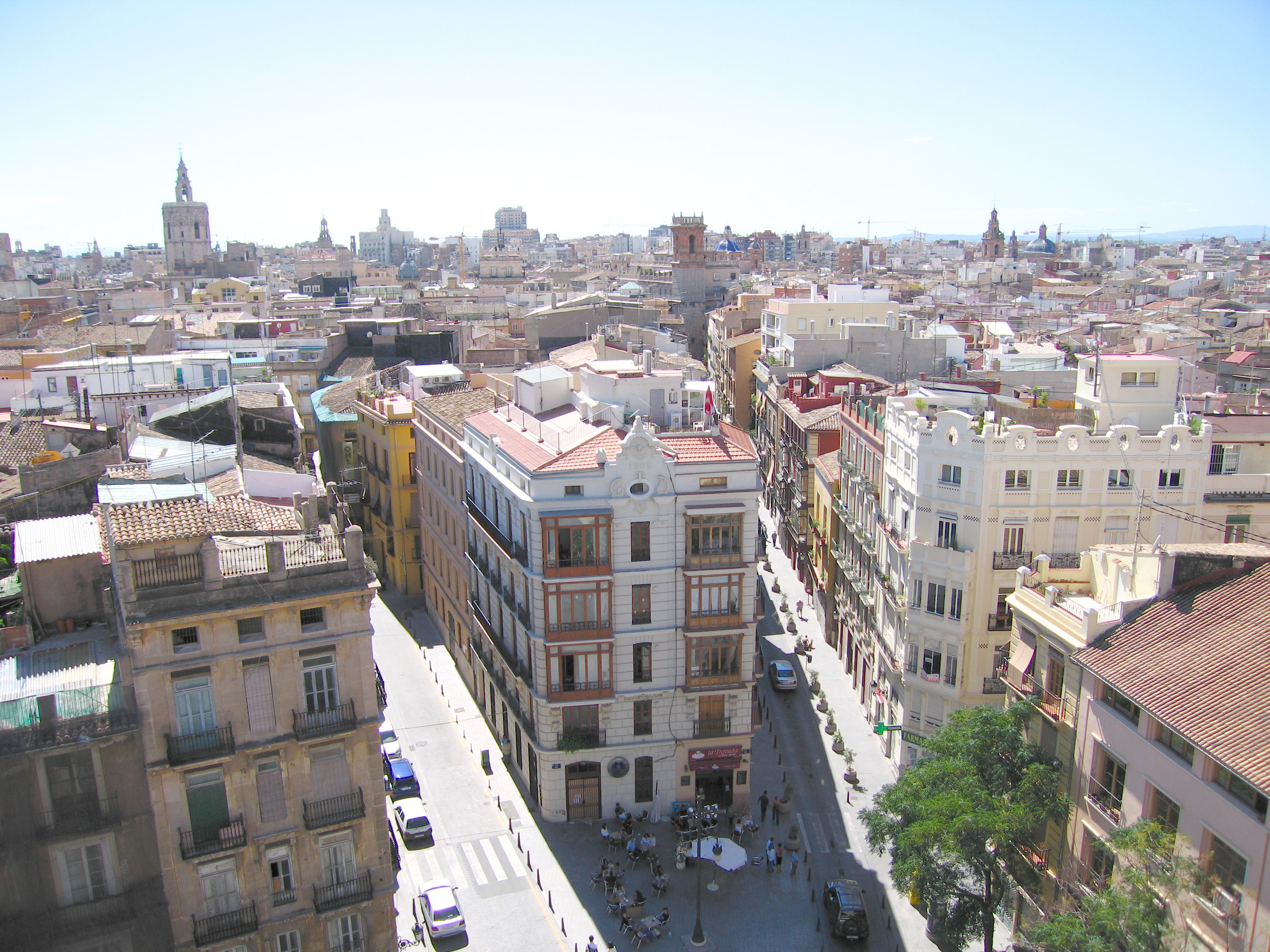 vista Ciutat Vella (València)